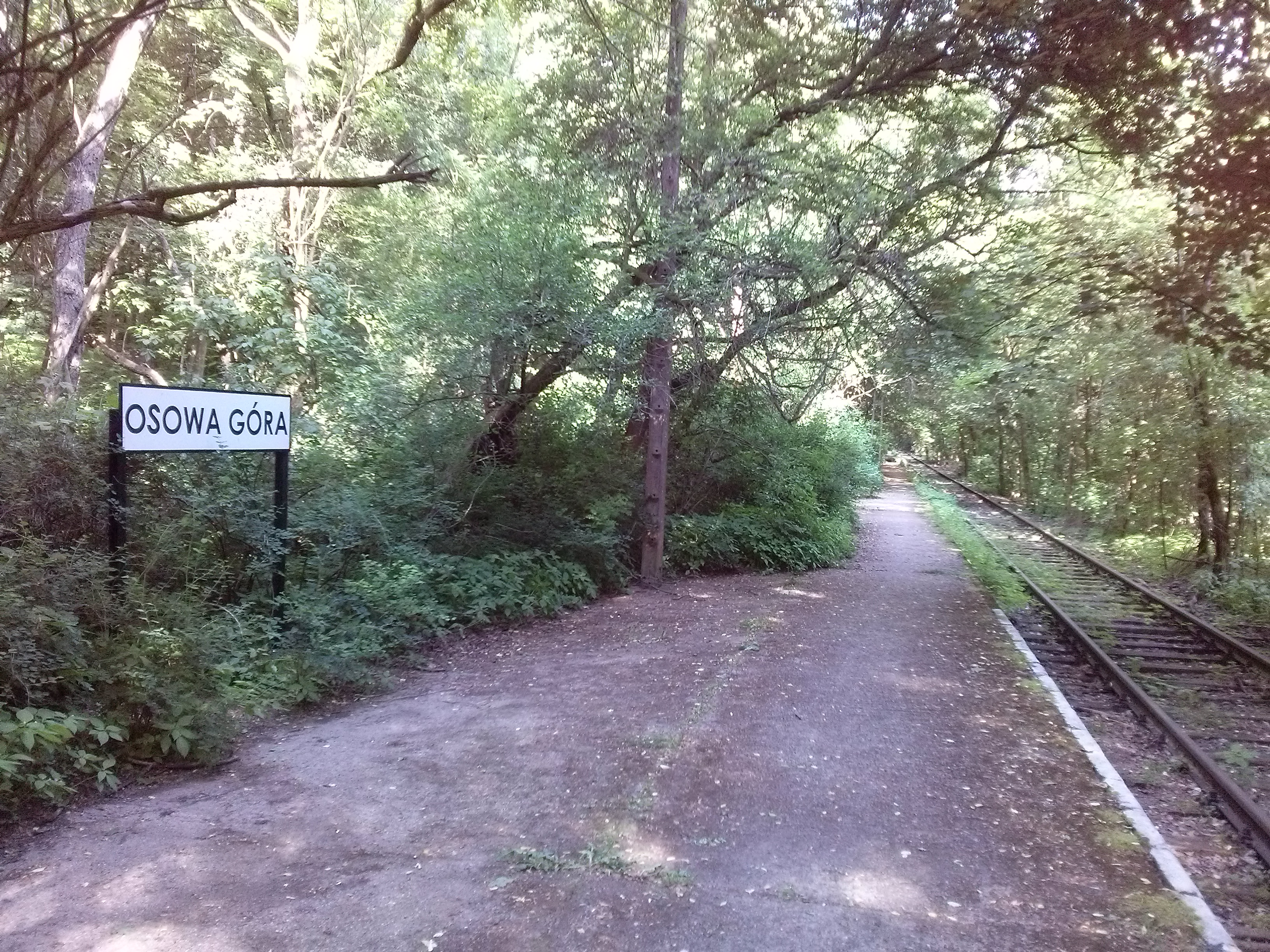 Peron na przystanku Osowa Góra (koniec linii kolejowej nr 361)